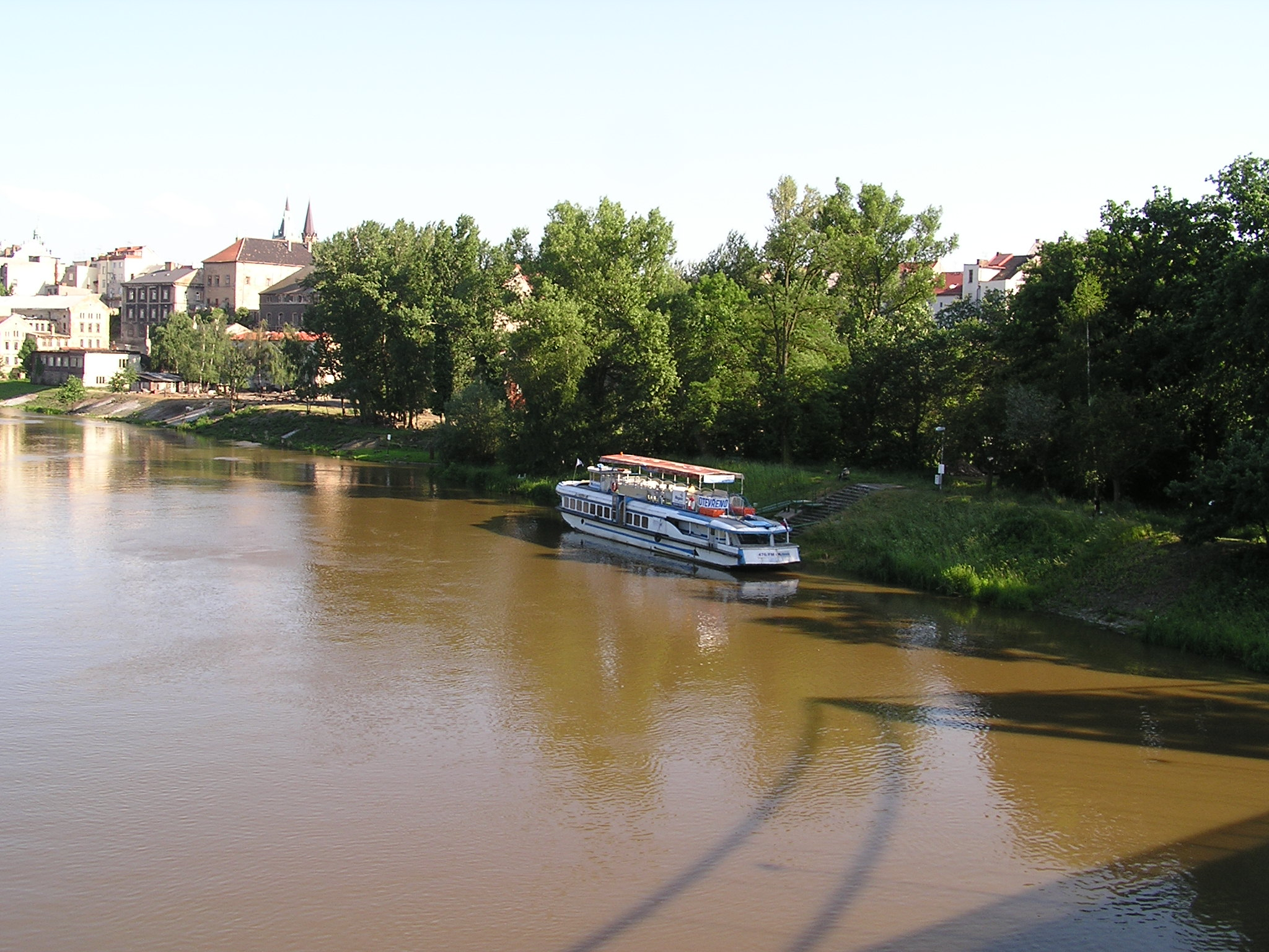 Přístaviště výletní lodi na Kmochově ostrově v Kolíně.